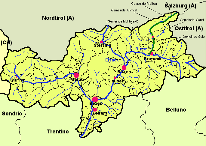 Karte Südtirols mit markiertem Tauferer Ahrntal sowie zugehörigen Gemeinden